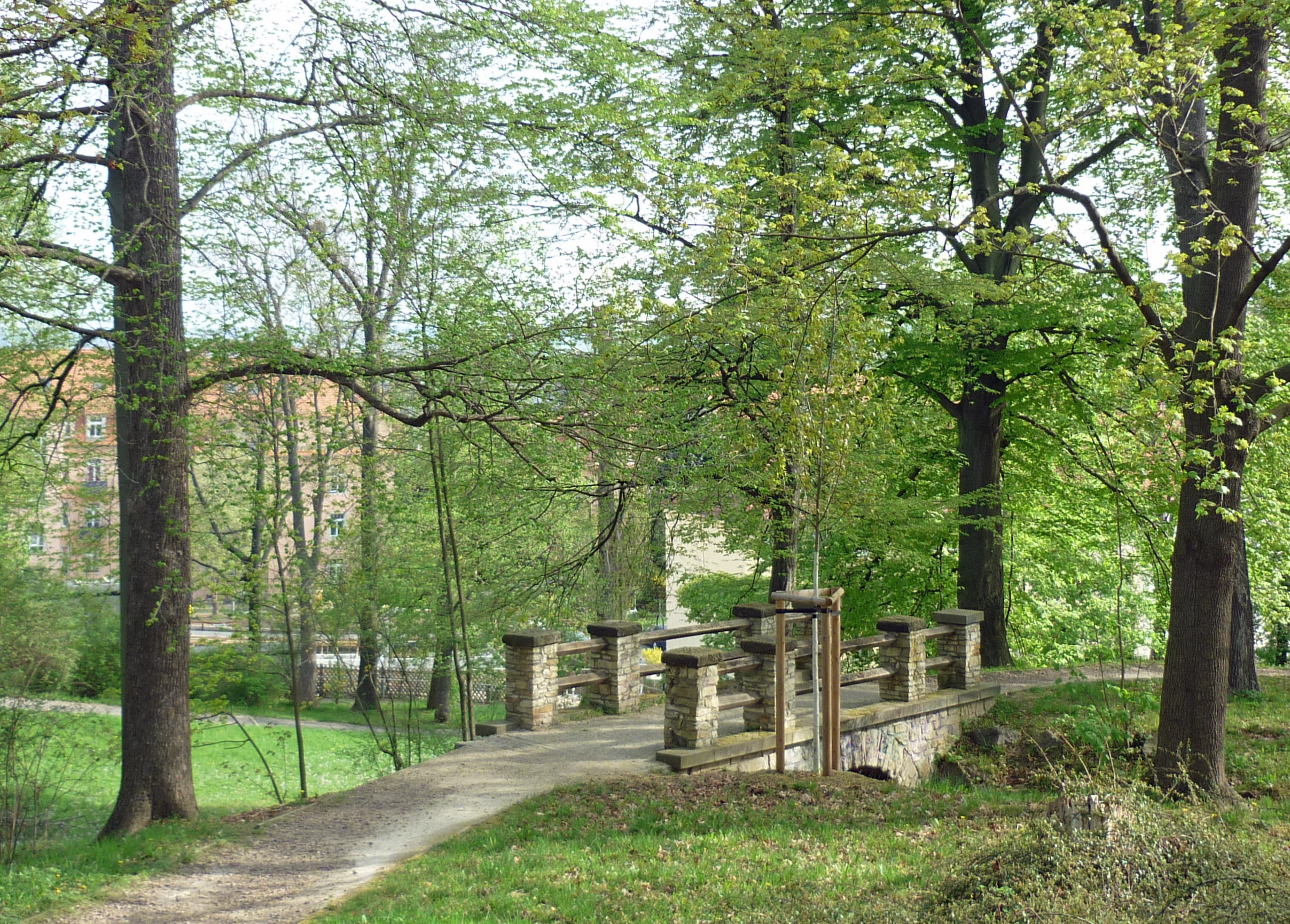 Neuer Bienertpark an der Paschkystr. in Dresden-Dölzschen